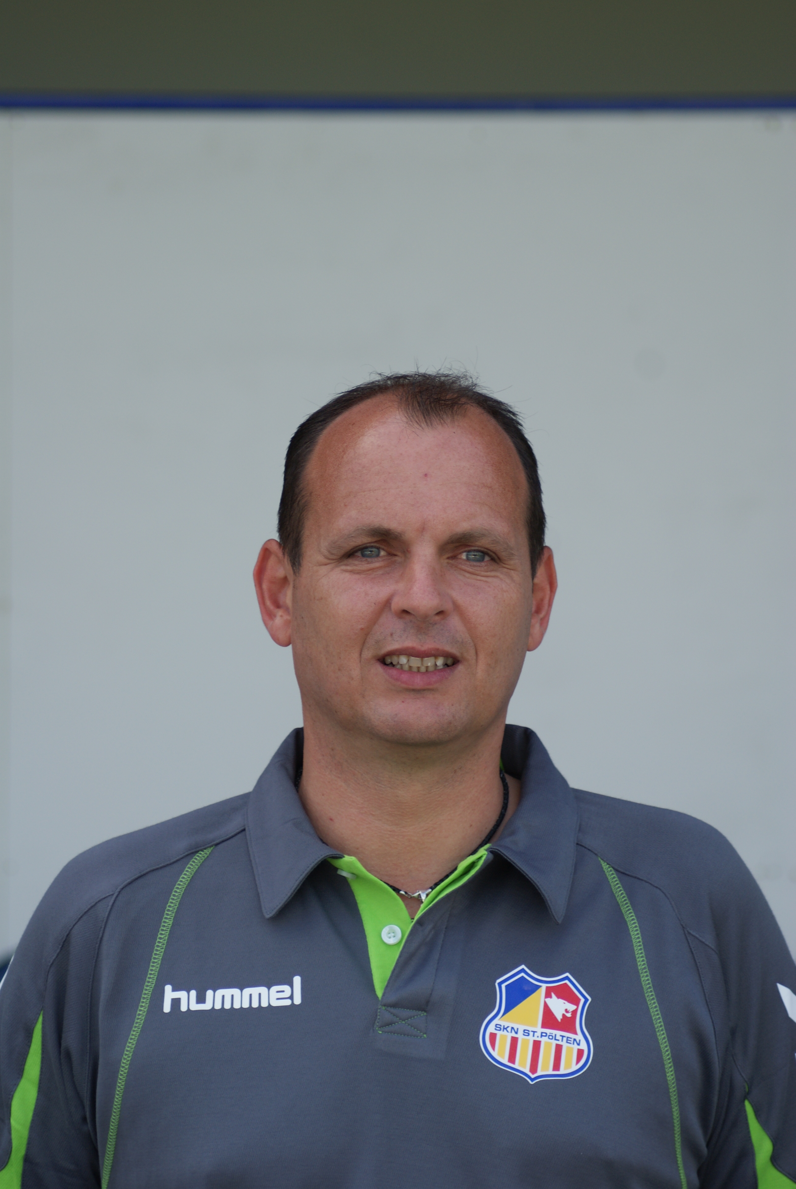 Martin Scherb, SKNV St. Pölten.